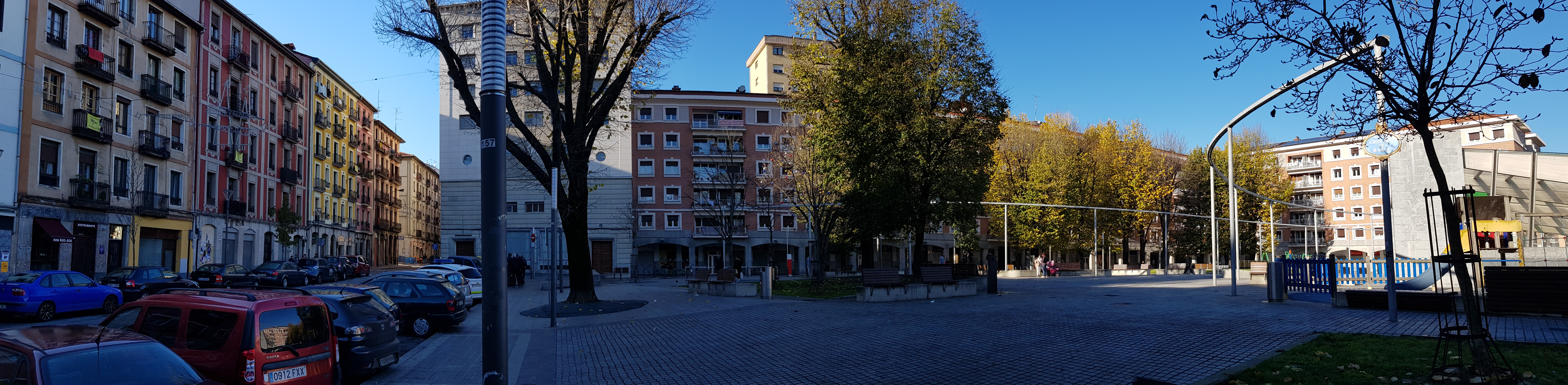 Mariaren Bihotza Plaza, San Frantzisko, Bilbo